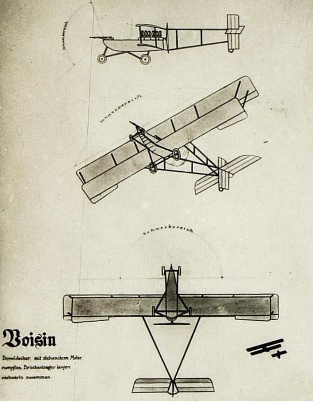 Kriegsalbum 40, Bild 11025